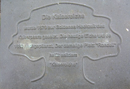 Plaque at the Kaisereiche in Berlin Friedenau